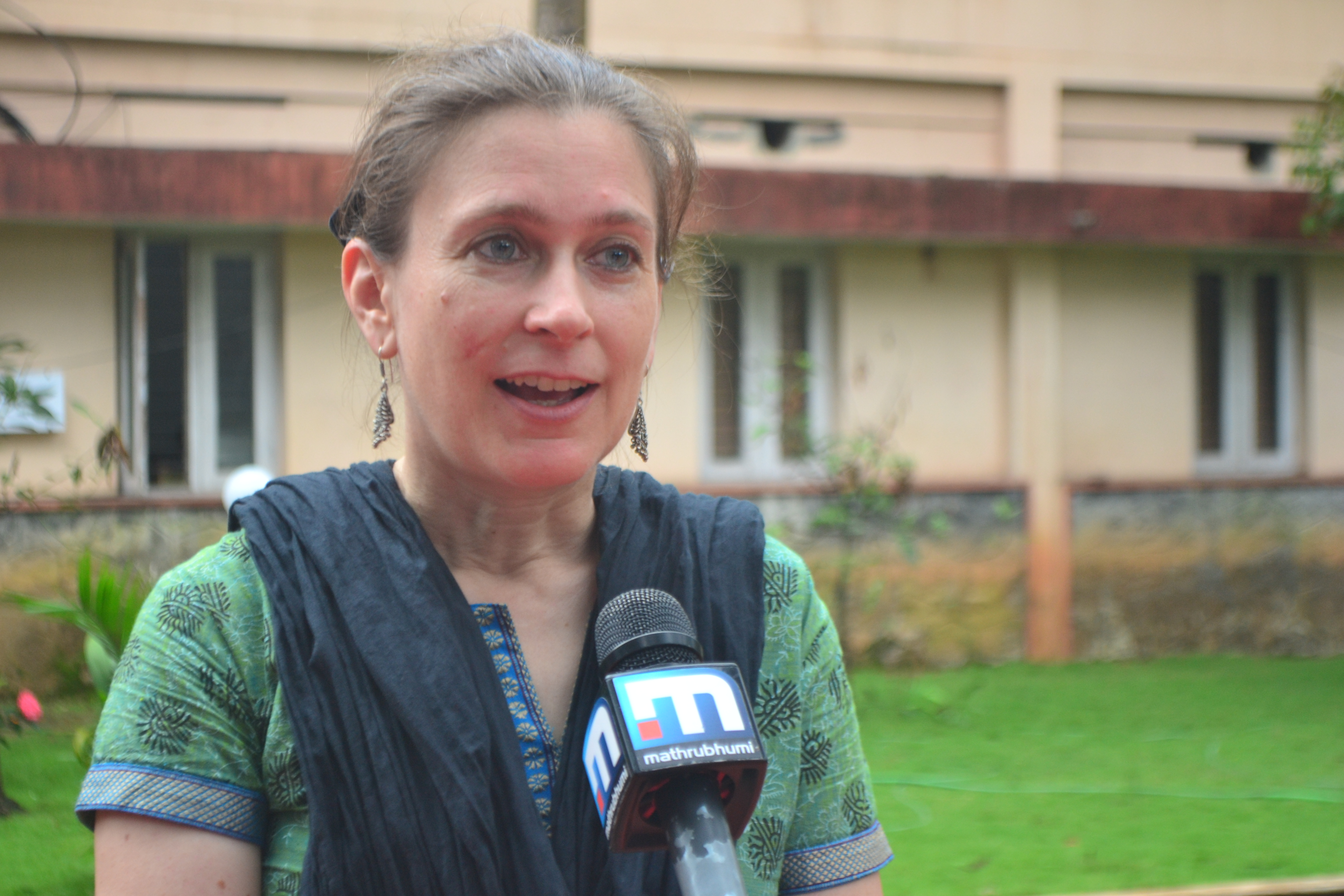 ഗുണ്ടര്‍ട്ട് ശേഖരം പൊതുജനങ്ങളിലേക്ക്.. മലയാളം വിക്കിമീഡിയയുടെ ആഭിമുഖ്യത്തില്‍ കാക്കനാട് കേരള പ്രസ്സ് അക്കാദമിയില്‍ നടന്ന പരിപാടിയില്‍ നിന്ന്. ജര്‍മനിയിലെ ട്യൂബിങ്ങണ്‍ സര്‍വകലാശാലയിലെ ഗുണ്ടര്‍ട്ട് ശേഖരം പൊതുസഞ്ചയത്തിലേക്ക്... ട്യൂബിങ്ങണ്‍ സര്‍വകലാശാലയിലെ ഇന്തോളജി വിഭാഗം പ്രഫസറും കൂടിയാട്ടത്തില്‍ അരങ്ങേറ്റം നടത്തിയ ആദ്യ വിദേശവനിതയുമായ ഡോ. ഹൈകെ മോസറുടെ കയ്യില്‍ നിന്നും മലയാളത്തിനു വേണ്ടി പ്രഫ. സ്കറിയ സക്കറിയ, പഴഞ്ചൊല്‍മാല എന്ന കൃതിയുടെ മാതൃകാ സ്കാനുകള്‍ ചടങ്ങില്‍ ഏറ്റുവാങ്ങി